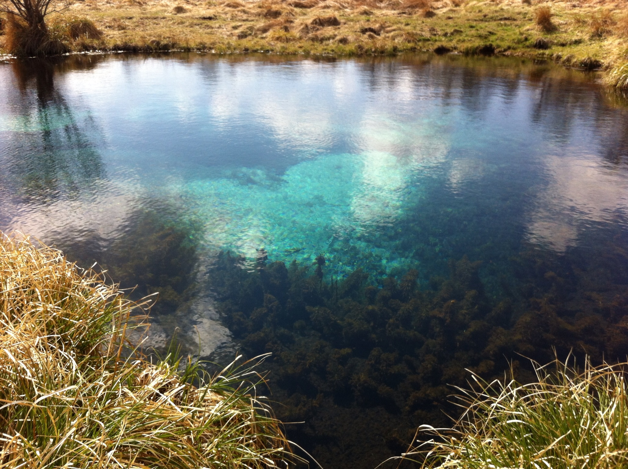 Store Blåkilde er traditionelt blevet anset for at være Danmarks vandrigeste kilde, men nyere opmålinger har vist at den rent faktisk ligger på tredjepladsen efter Lille Blåkilde og Blåhøl. Vandføringen i hovedkilden er ca. 80 liter/sek. Tæller man flere tilløb fra mindre kilder med bliver vandføringen omkring 300 liter/sek. Kildens bassin er 12 meter på det bredeste sted og vanddybden er mellem 4-5 meter. Som i andre kilder er vandtemperaturen konstant hele året på 7-8 grader.